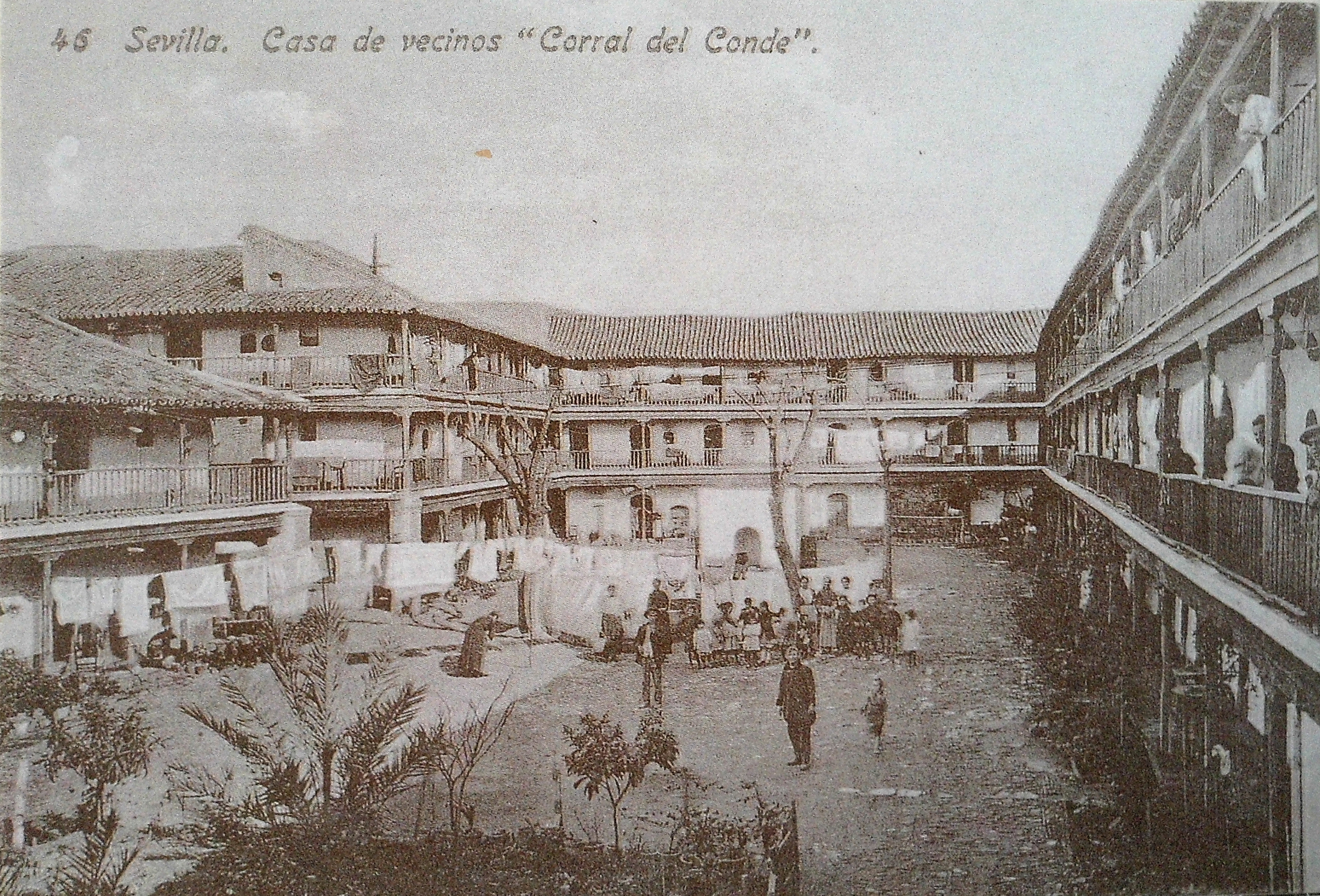 Sevilla. Casa de vecinos "Corral del Conde"